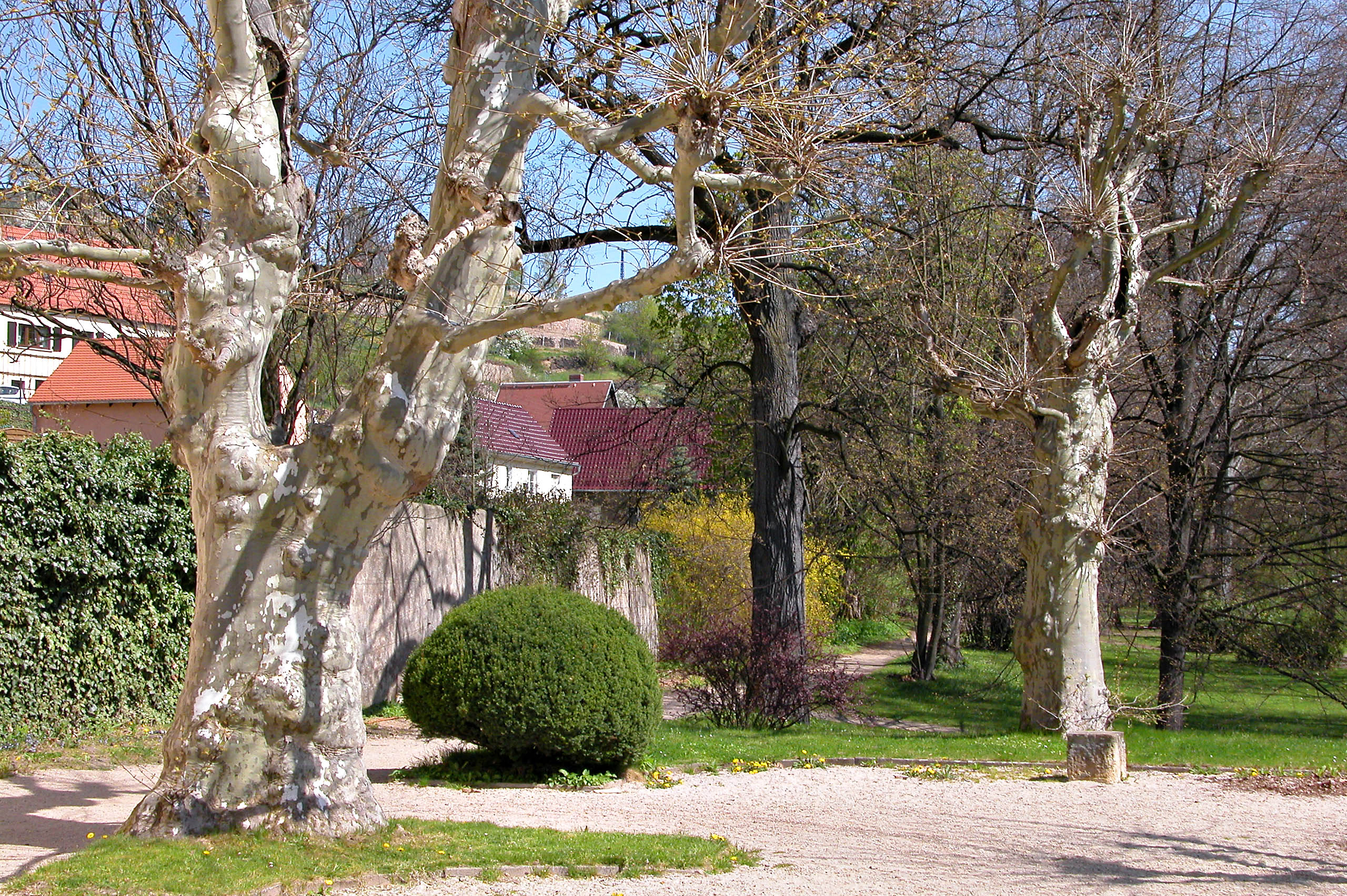 21.04.2005 01612 Seußlitz (Nünchritz): Im Schloßpark. Markgraf Heinrich der Erlauchte hatte den Herrensitz in Seußlitz 1268 den Klarissen, dem weiblichen Zweig des Franziskanerordens, überlassen. Nach der Auflösung des Klosters 1540 erwarb der sächsische Kanzler Dr. Simon Pistorius das Anwesen. Heinrich Graf von Bünau ersetzte die alten Klostergebäude zwischen 1722 und 1727 durch eine herrschaftliche Schloßanlage (GMP: 51.241017,13.417670). [DSCN6365.TIF]20050421026DR.JPG(c)Blobelt